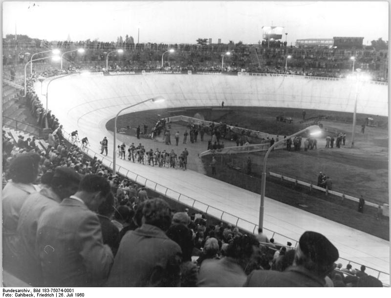 Chemnitz, Radrennbahn Zentralbild Gahlbeck Sd-Fr Die Zementbahn in Karl-Marx-Stadt Am 23.7.1960 war Premiere auf der neu hergerichteten Zementbahn in Karl-Marx-Stadt für die Radweltmeisterschaften, ausgezeichnet sind die Lichtverhältnisse und die Beschaffenheit des Zementbelags. UBz: Auf dieser Bahn, die am 31.7.1960 offiziell der sozialistischen Sportbewegung übergeben wird, erfolgt am gleichen Tage die Meisterschaftsrevanche der Steher.